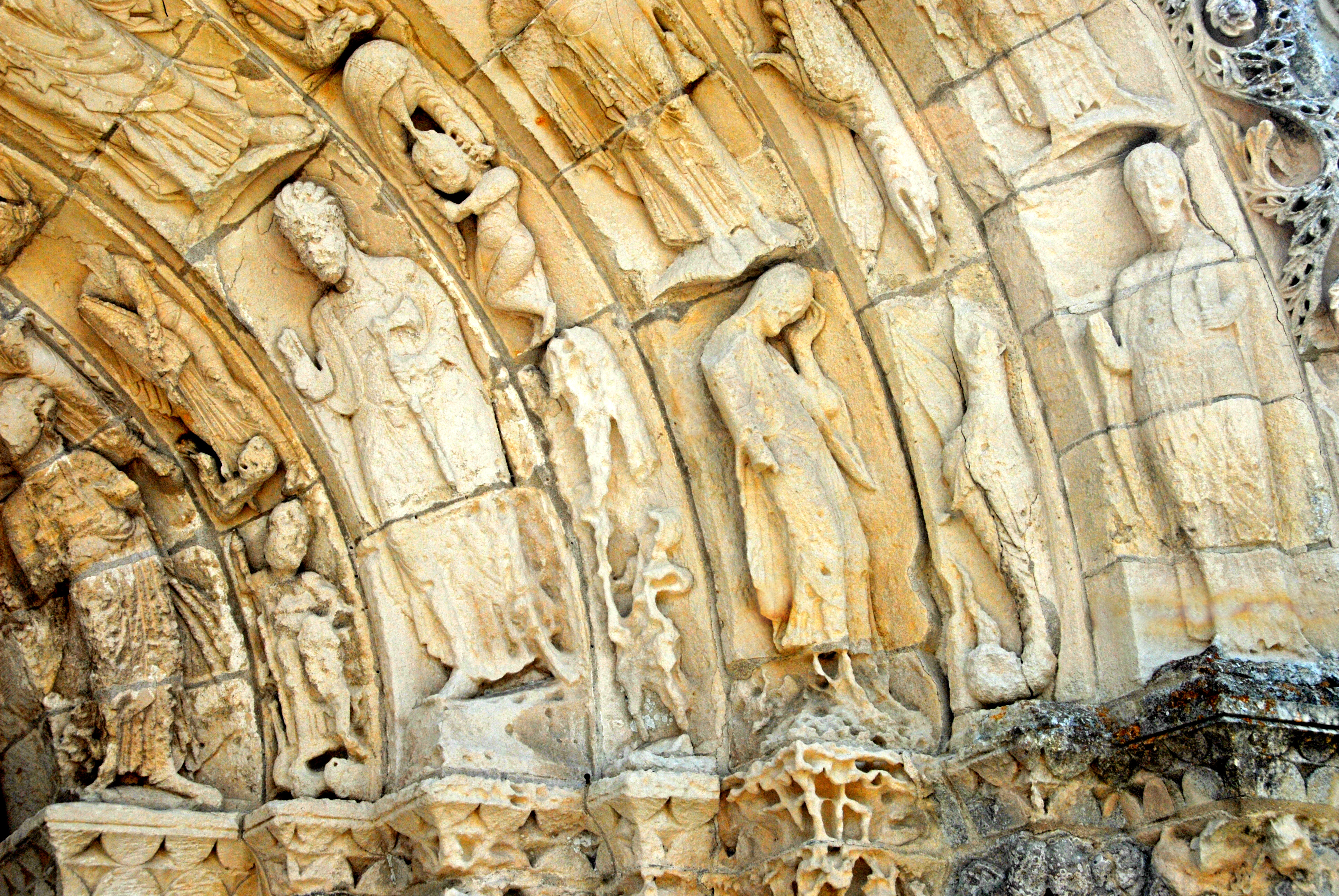 Chadenac,Portal, Detail links